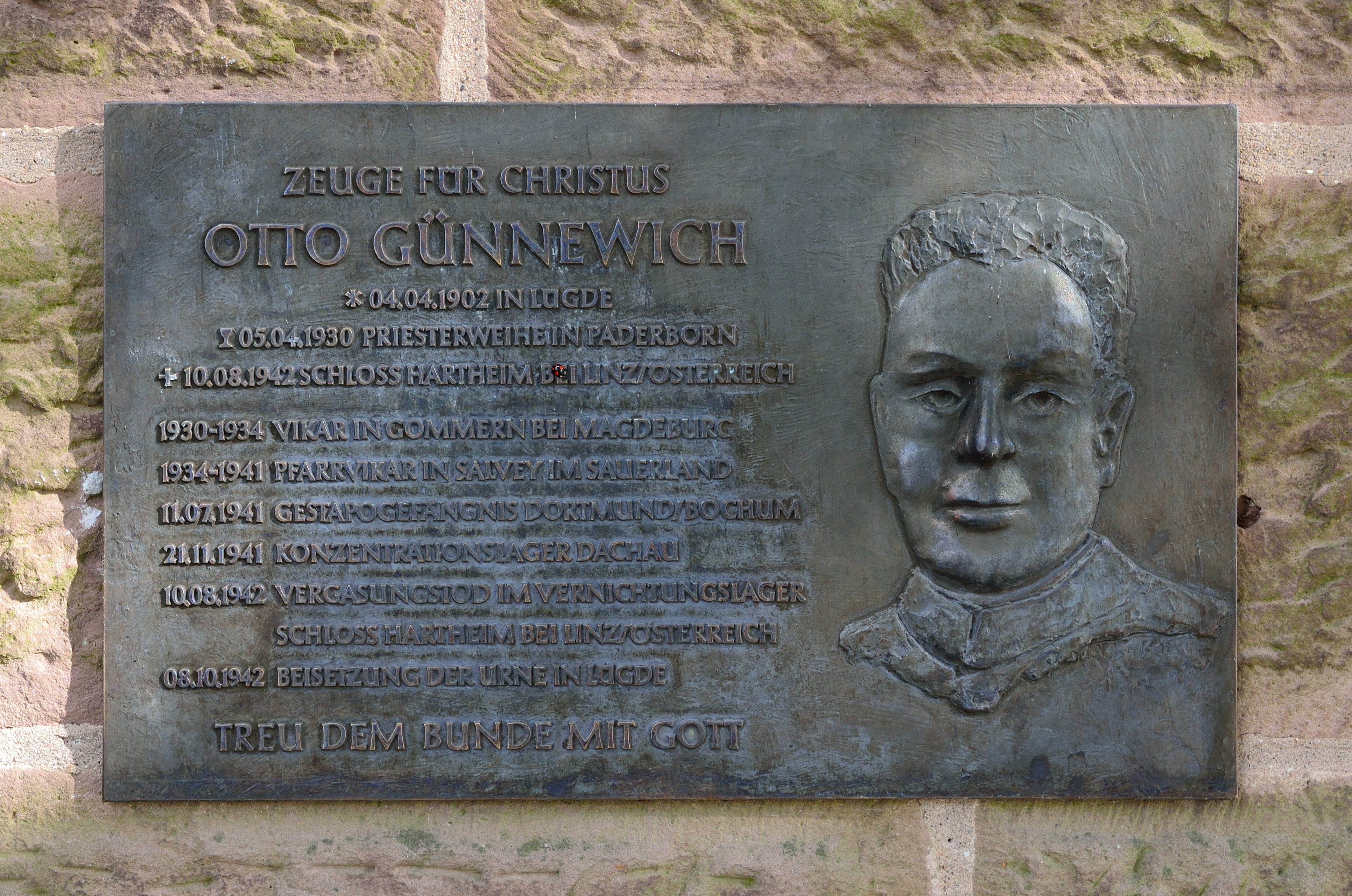 Lügde, katholische Kirche St. Marien, Gedenktafel für Otto Günnewich